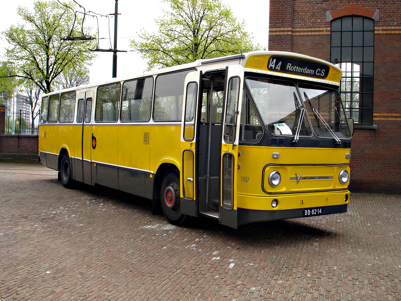 Citosa ex WSM 1107 HBM Den Haag